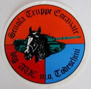 Stemma della Scuola Truppe Corazzate su sfondo rosso e blu con immagini in rilievo di un carro armato ed una testa di cavallo